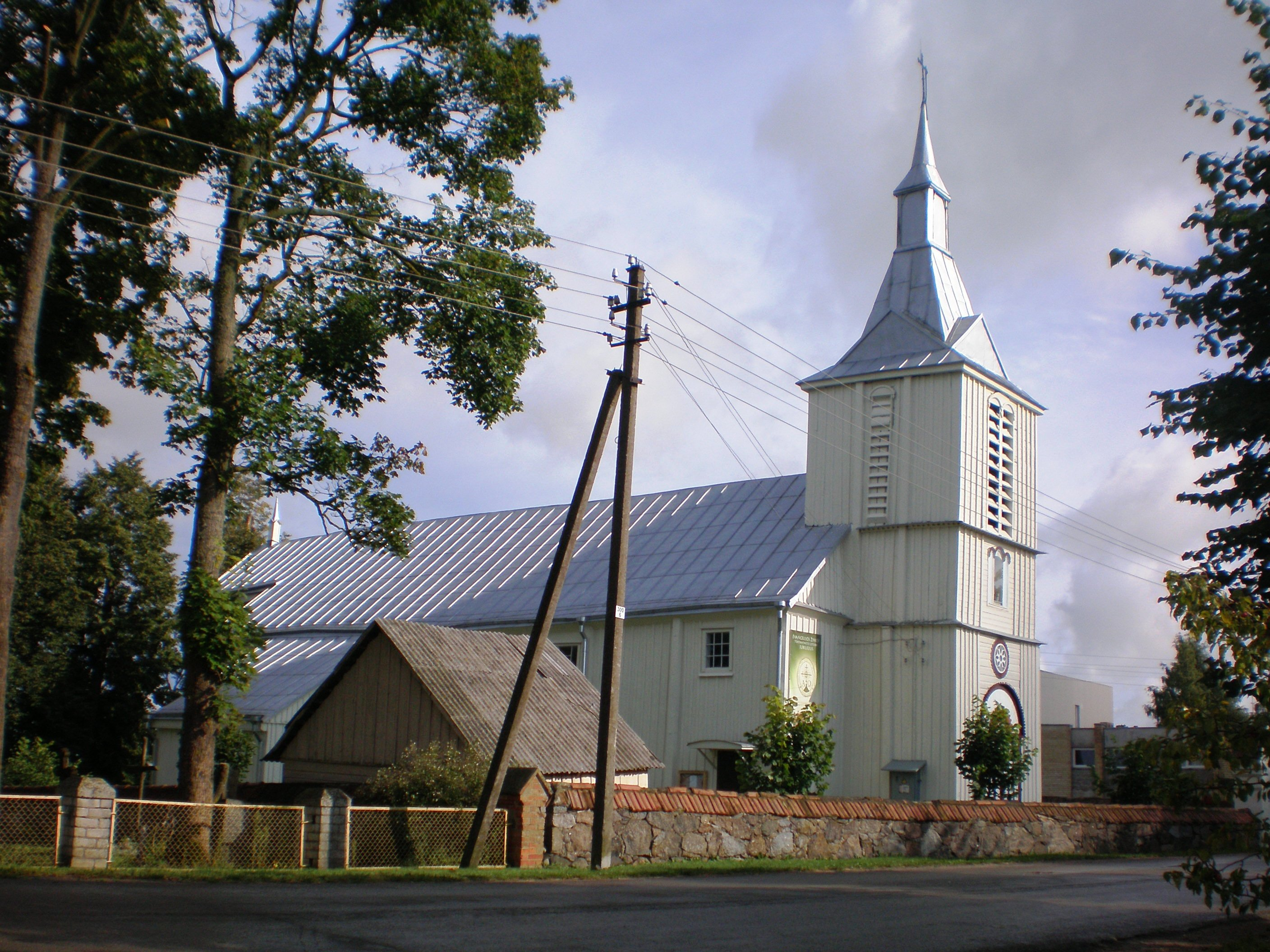 Pernaravos bažnyčia, Kėdainių raj., Lietuva